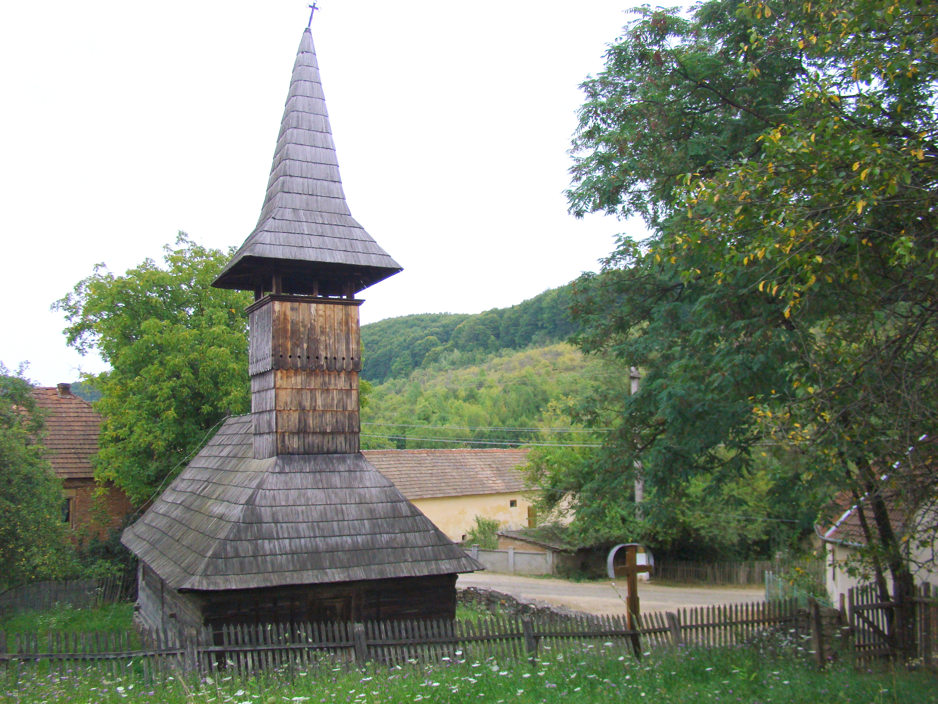 Biserica de lemn „Întâmpinarea Domnului” din Groșii Noi-Arad